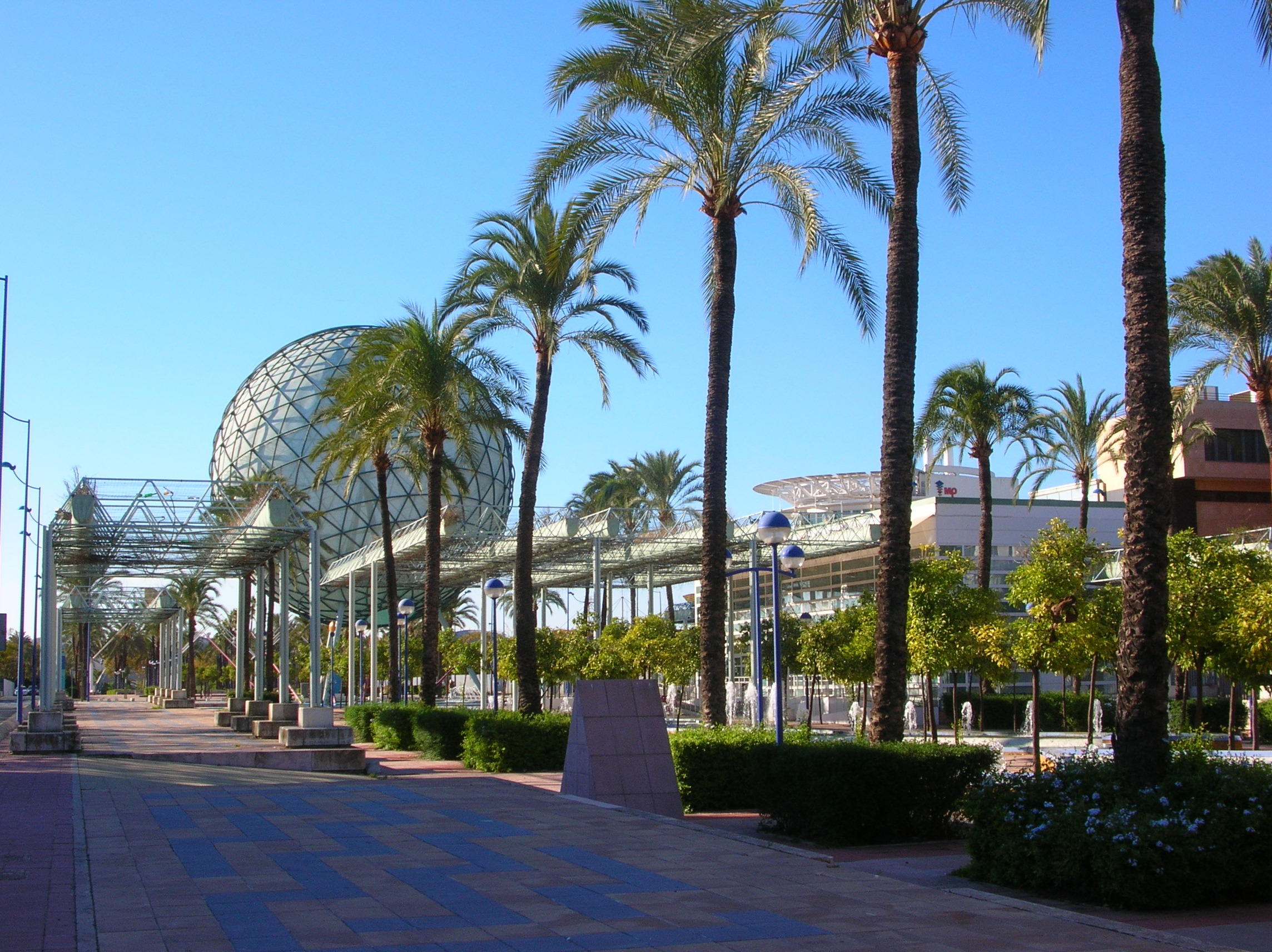 Una de las calles de la Exposición Universal de Sevilla de 1992 15 años después; actualmente, parte del parque tecnológico Cartuja'93; Al fondo, la esfera bioclimática.